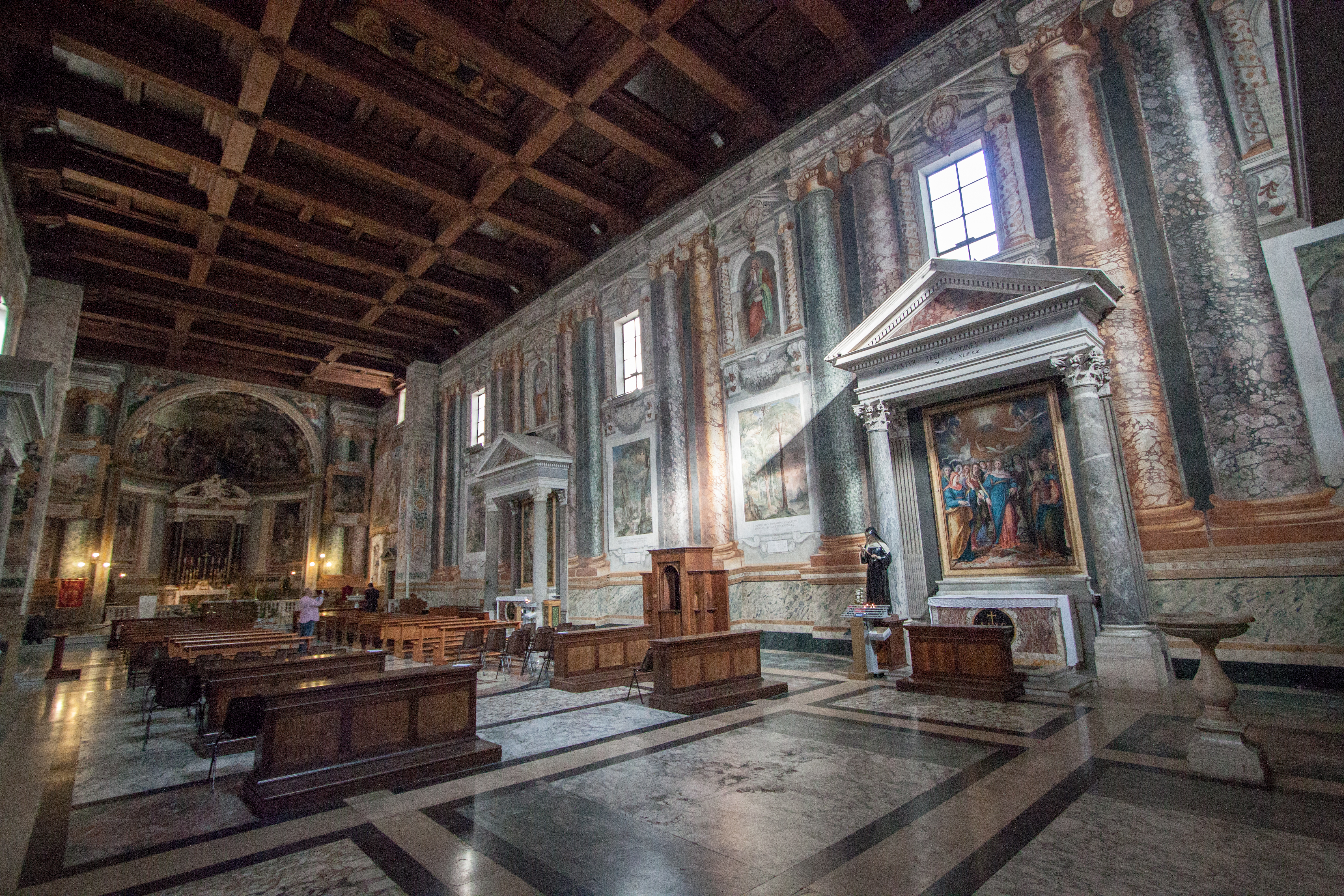 San Vitale Roma